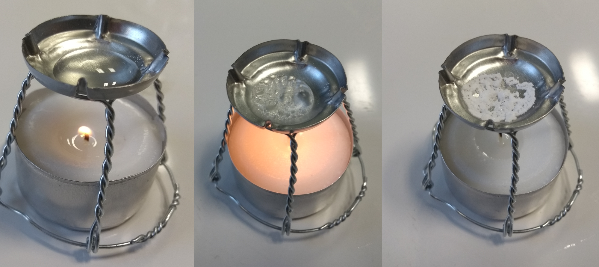 Eindampfen einer Salzlösung im Microscale-Experiment: Das Teelicht erhitzt die Schale der Agraffe (Metallverschluss einer Sektflasche, links), sodass das Wasser siedet (mittig) und verdampft. Übrig bleibt das Salz im festen Zustand (rechts).